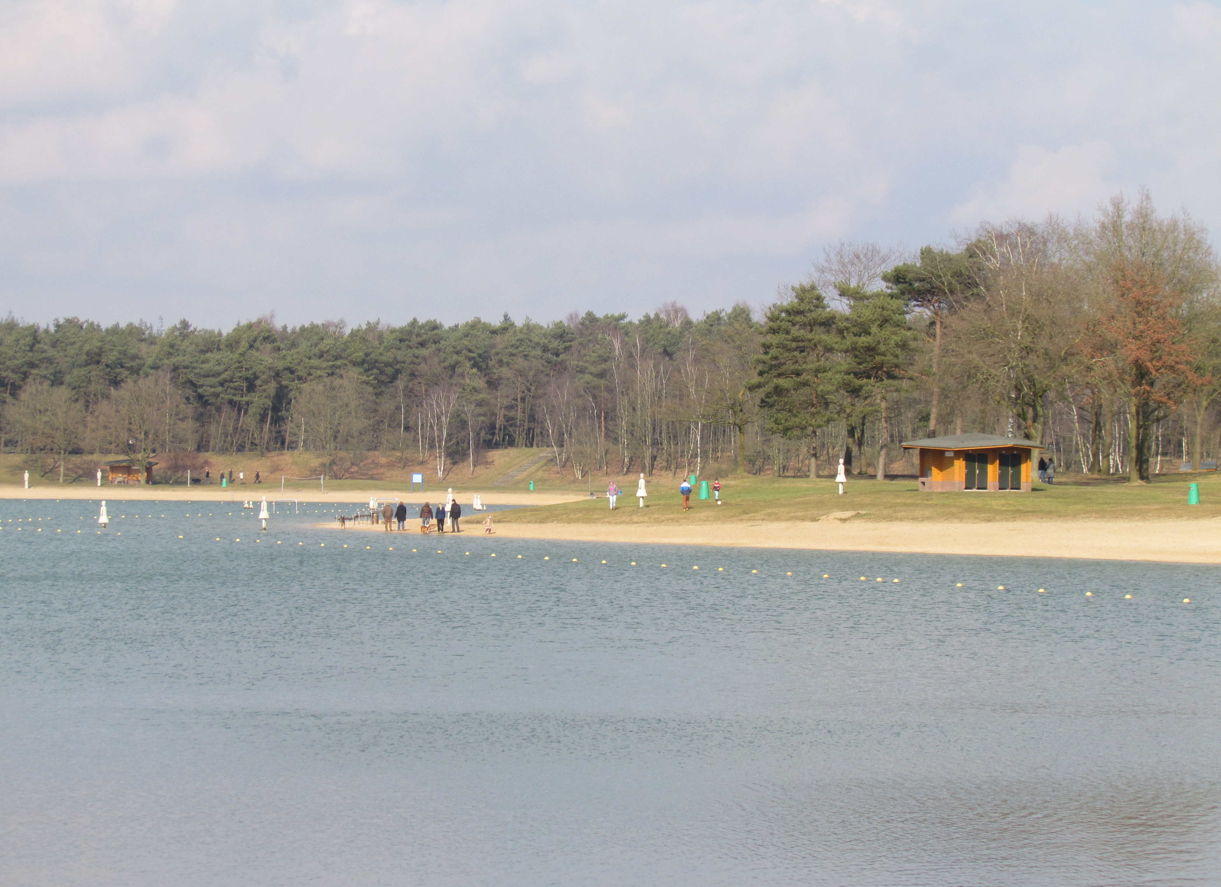 Heerderstrand, recreatieplas bij Heerde (NL)